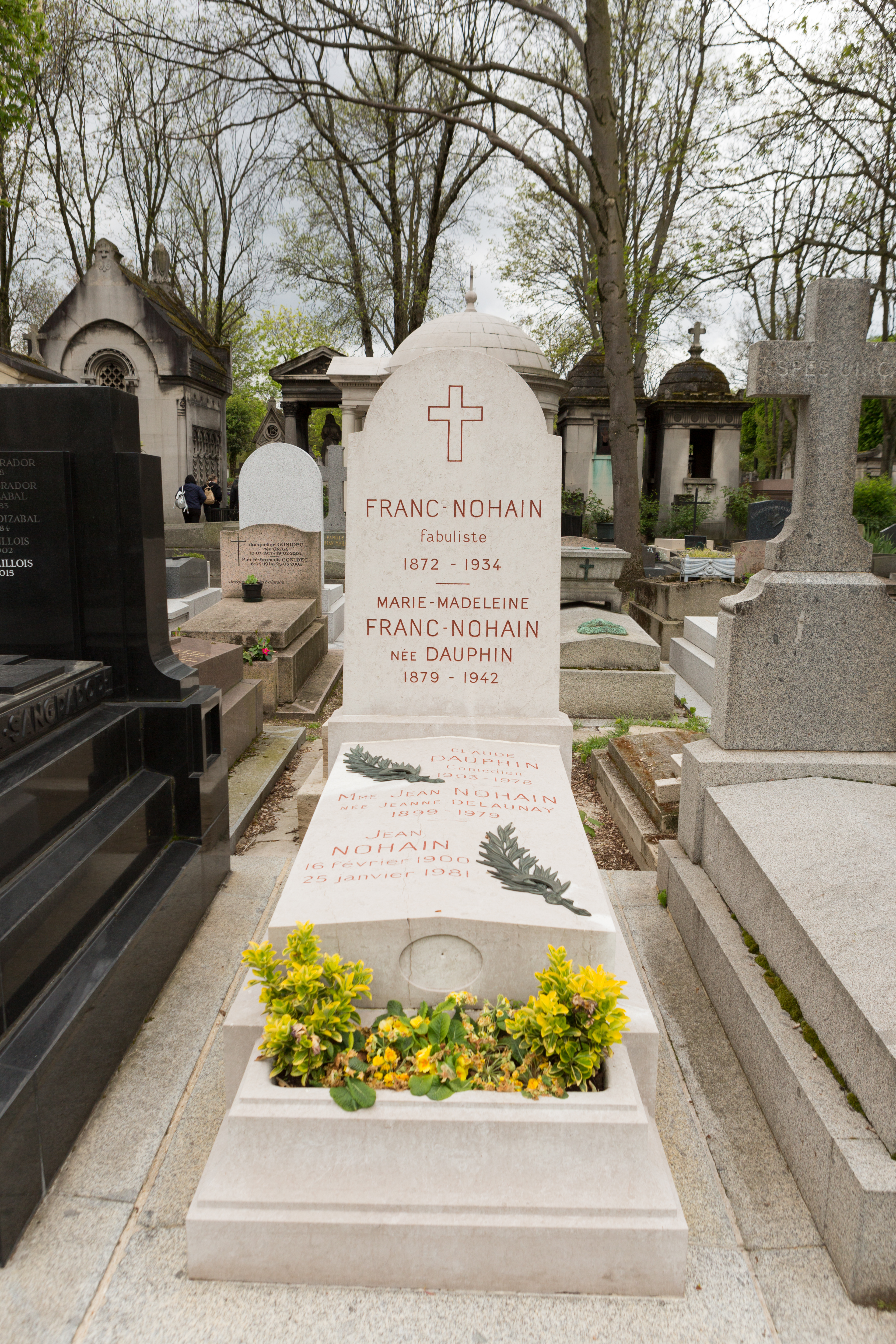 Sépulture de Franc-Nohain (1872-1934), avocat, sous-préfet, écrivain, poète et librettiste ; Jean Nohain (1900-1981), fils de Franc-Nohain, animateur et parolier ; Claude Dauphin (1903-1978), fils de Franc-Nohain et comédien ; Marie-Madeleine Franc-Nohain (1879-1942), épouse de Franc-Nohain et illustratrice.